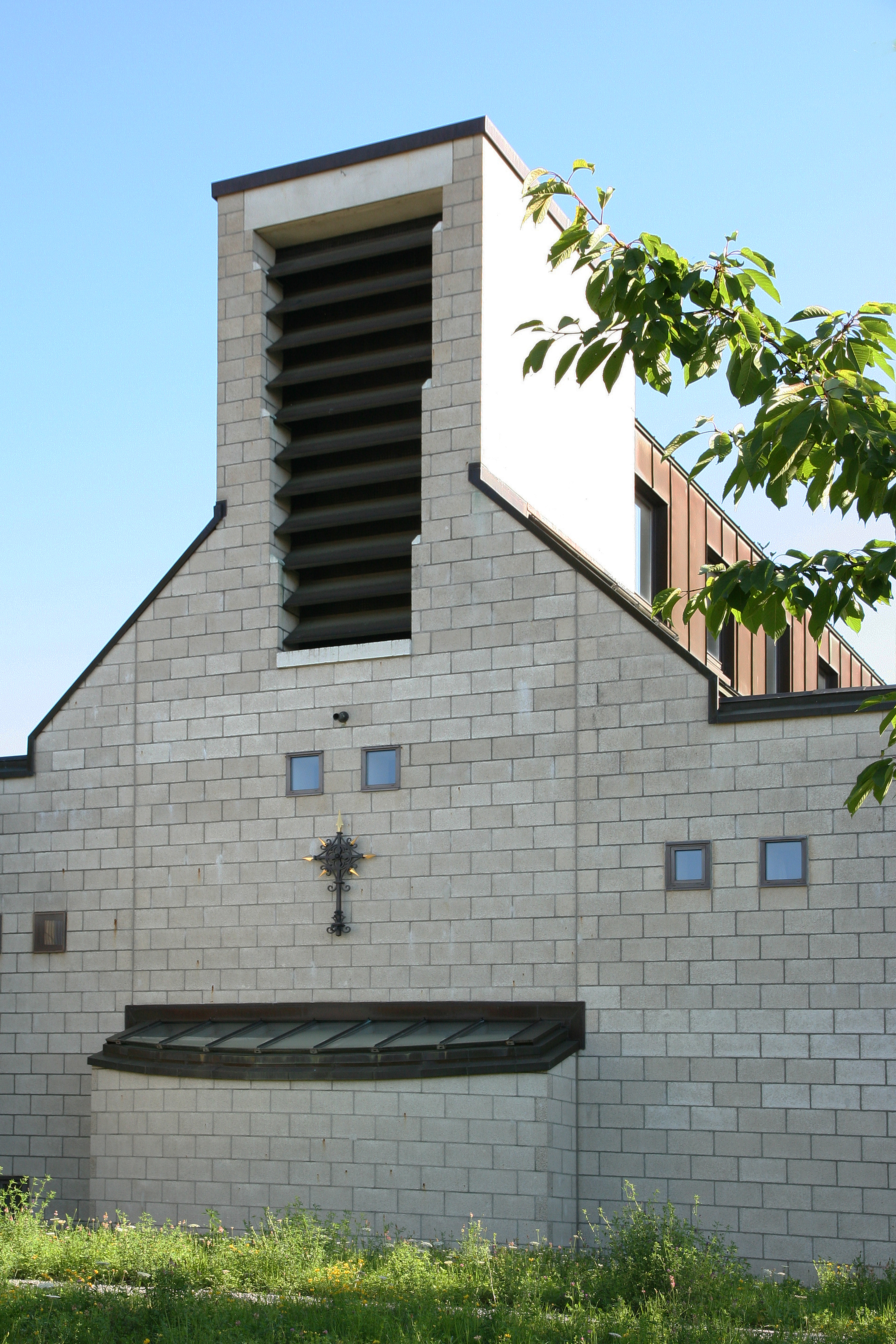 Römisch-katholische Pfarrkirche St. Josef Affoltern am Albis, Glockenturm